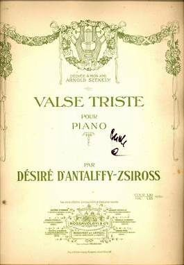 Antalffy-Zsiross Dezső: Valse triste